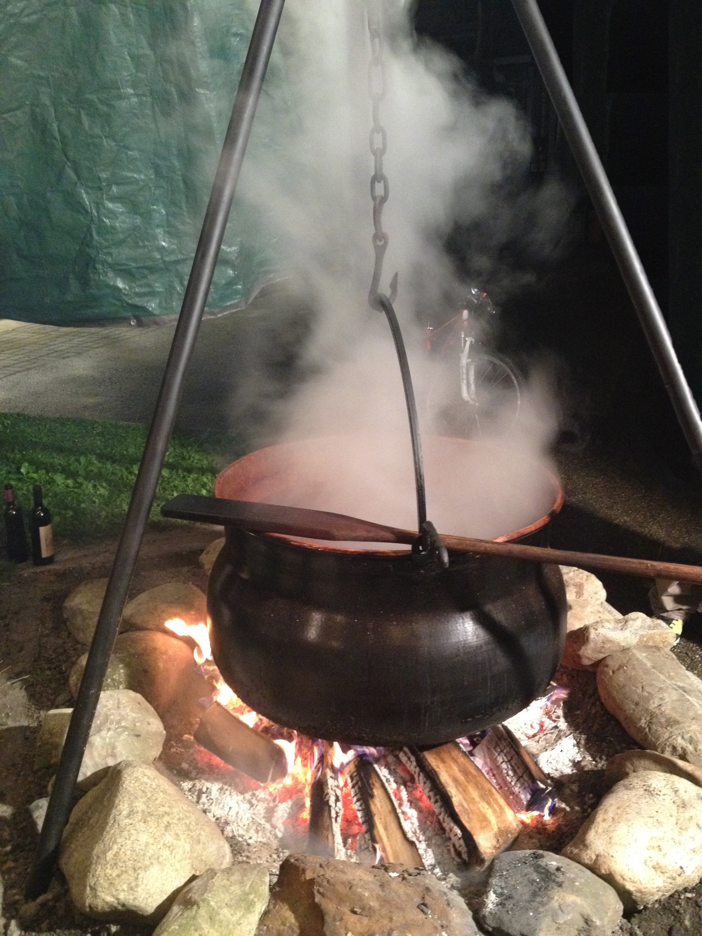 Chaudron utilisé à Chevilly (Suisse, Canton de Vaud) pour la préparation de la raisinée